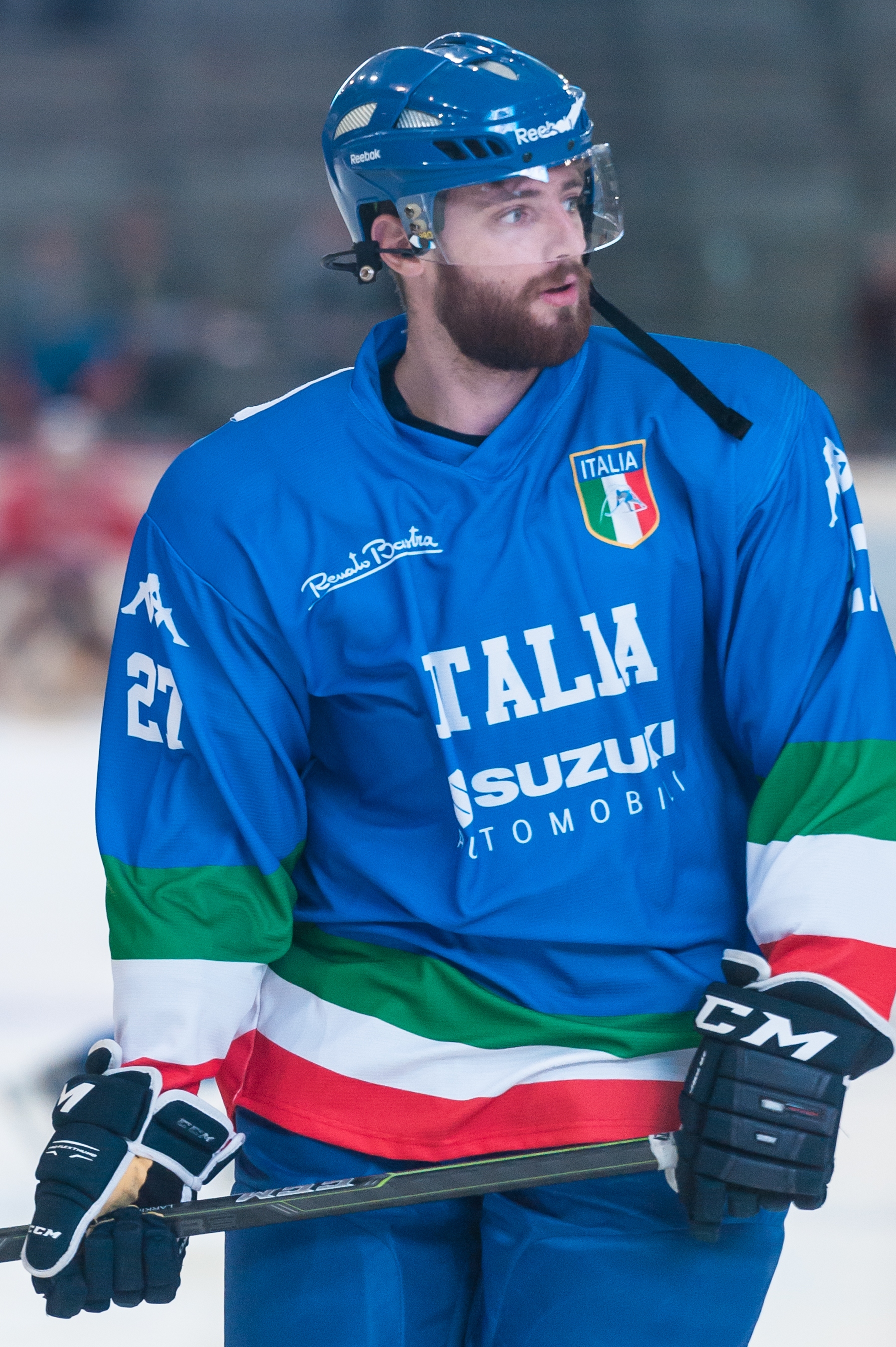 Freundschaftliches Eishockey-Länderspiel - Österreich vs Italien. Bild zeigt Thomas Larkin (ITA).